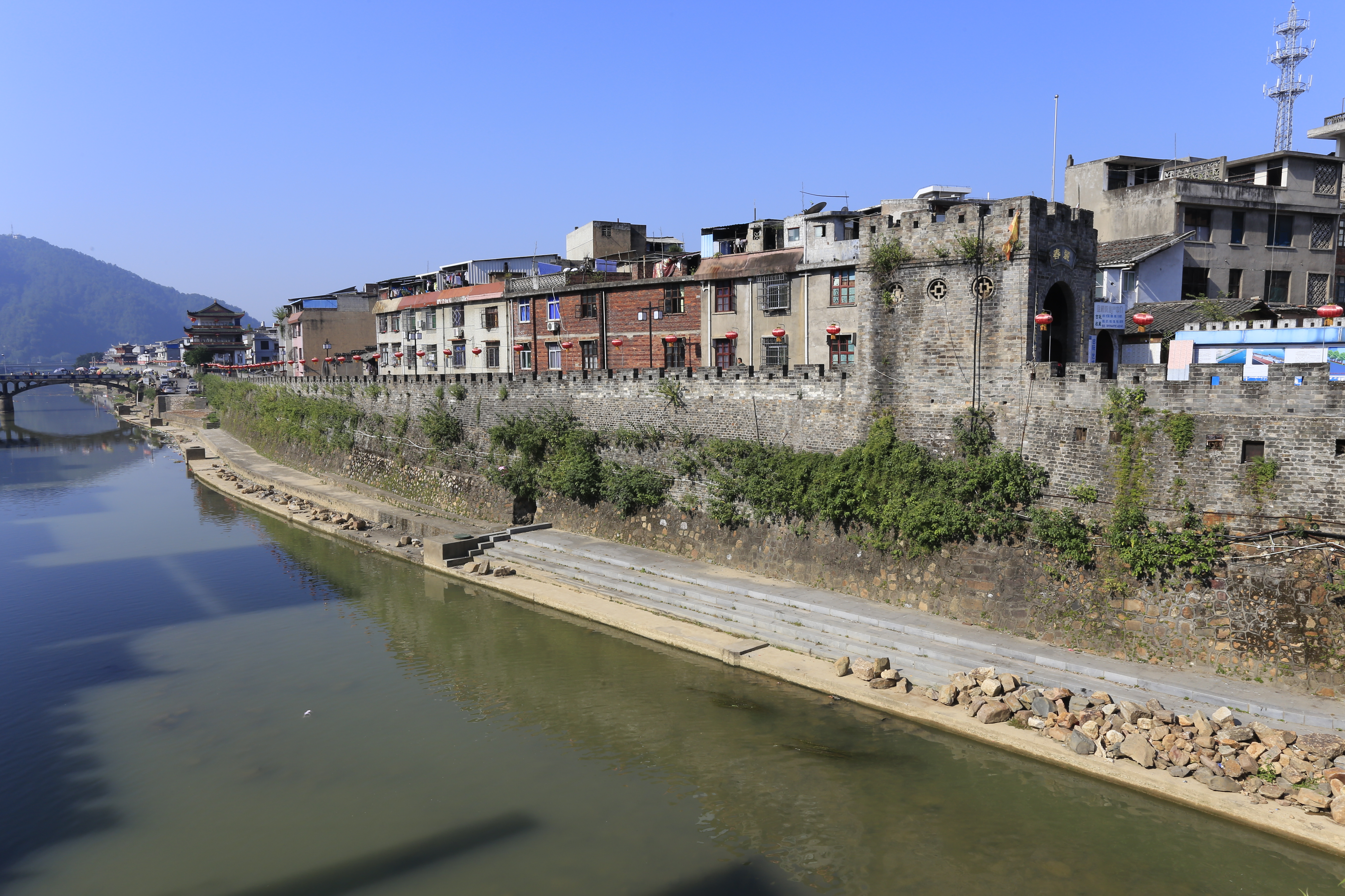 福建省长汀县城墙—— 丽春烽火台，远处为五通门